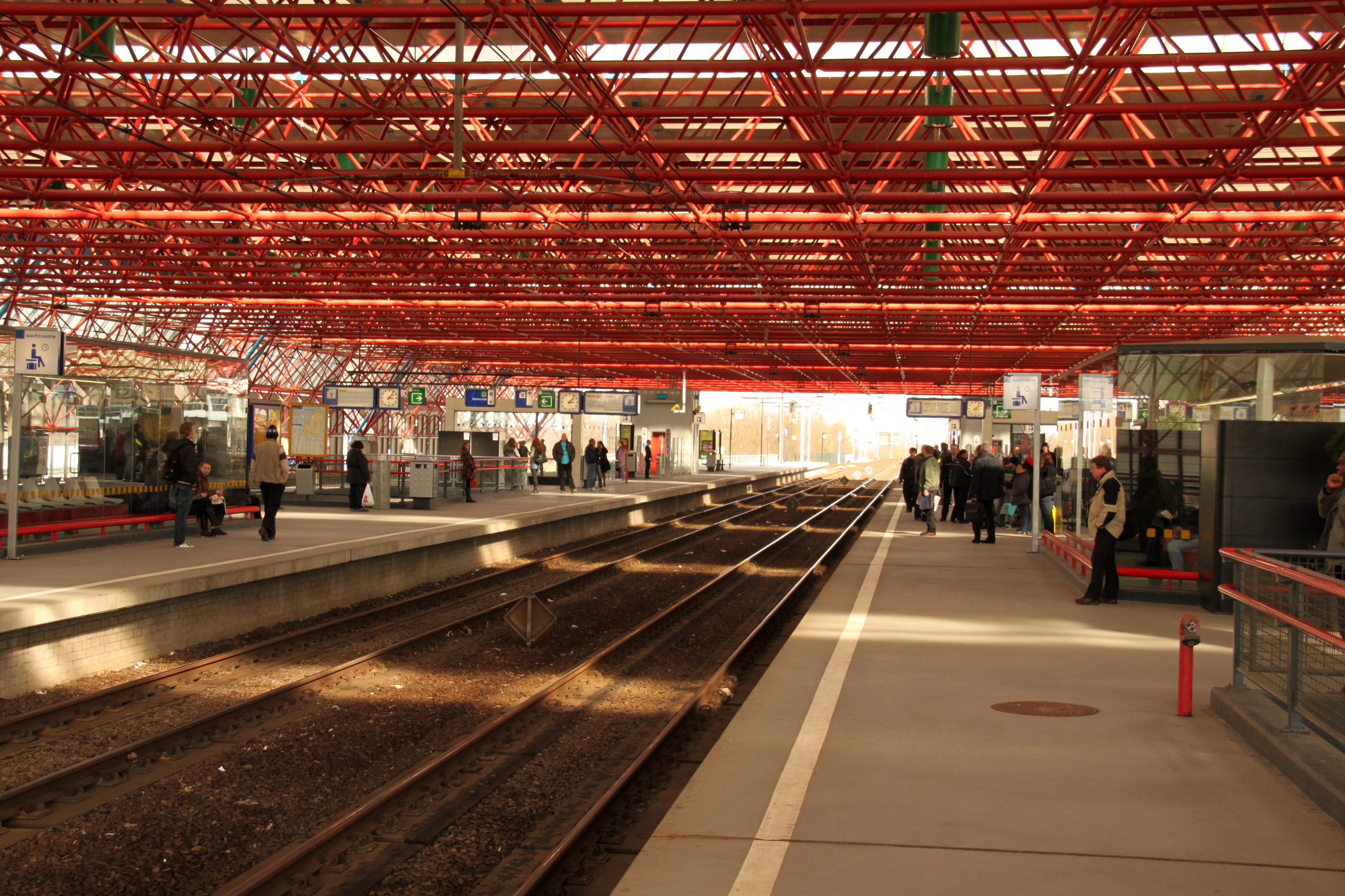 Stationskap van Almere Centrum